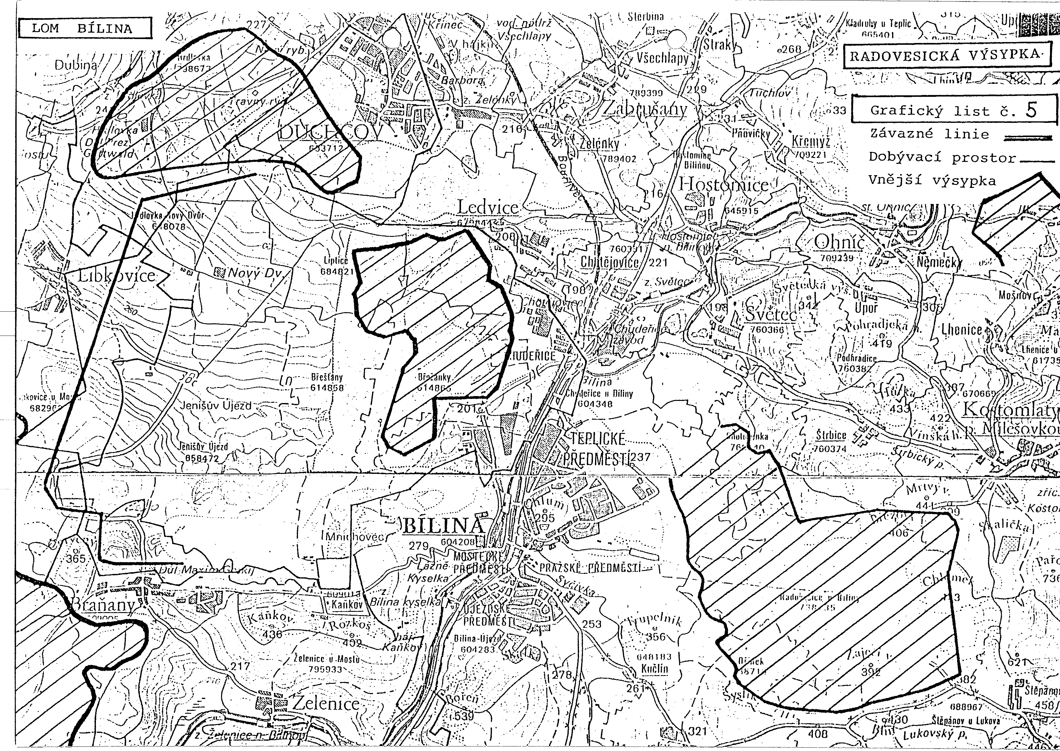 Hranice dobyvacího prostoru severočeských hnědohuhelných lomů Bílina.